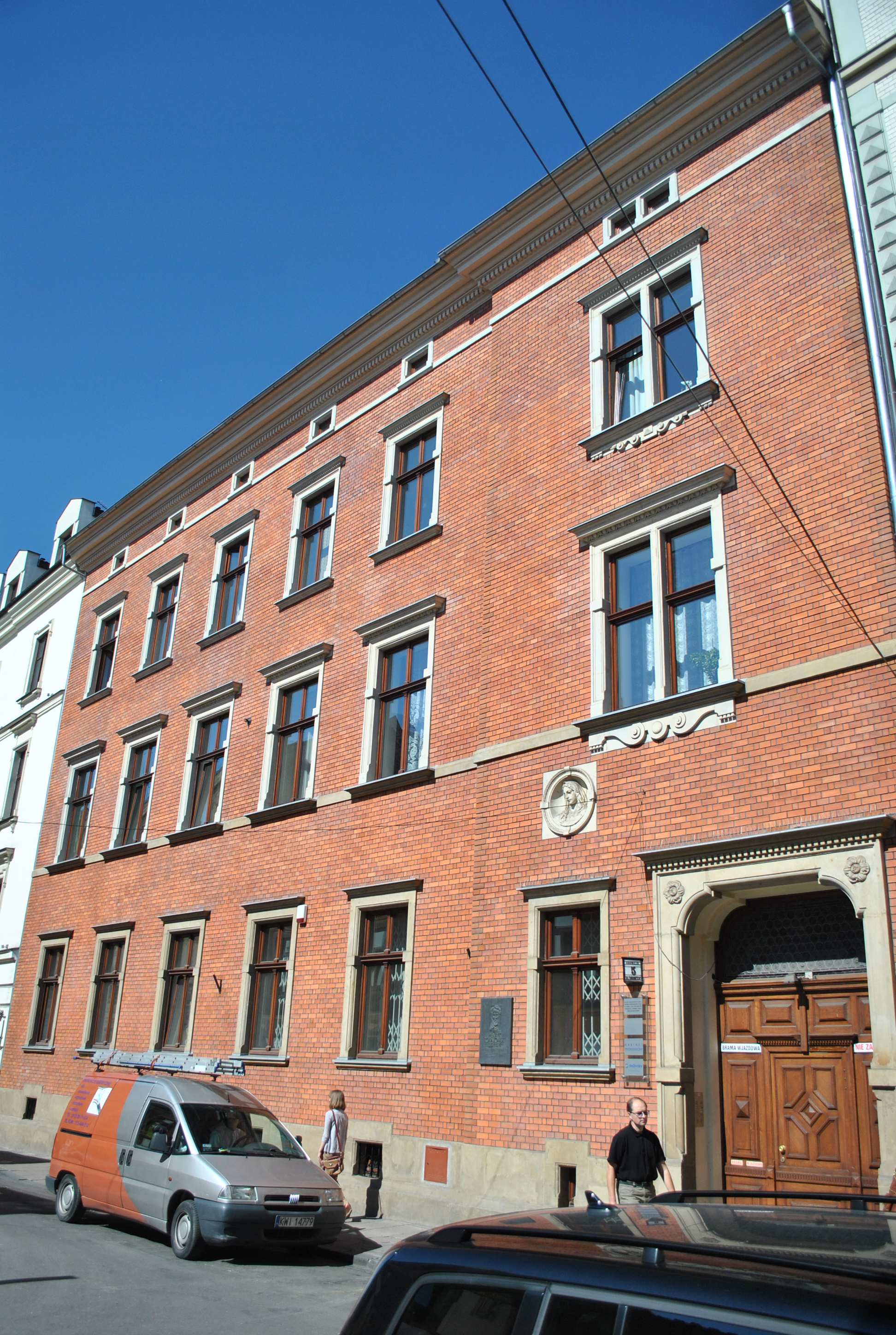 Kamienica przy ulicy Krupniczej 5 w Krakowie, widok od frontu.